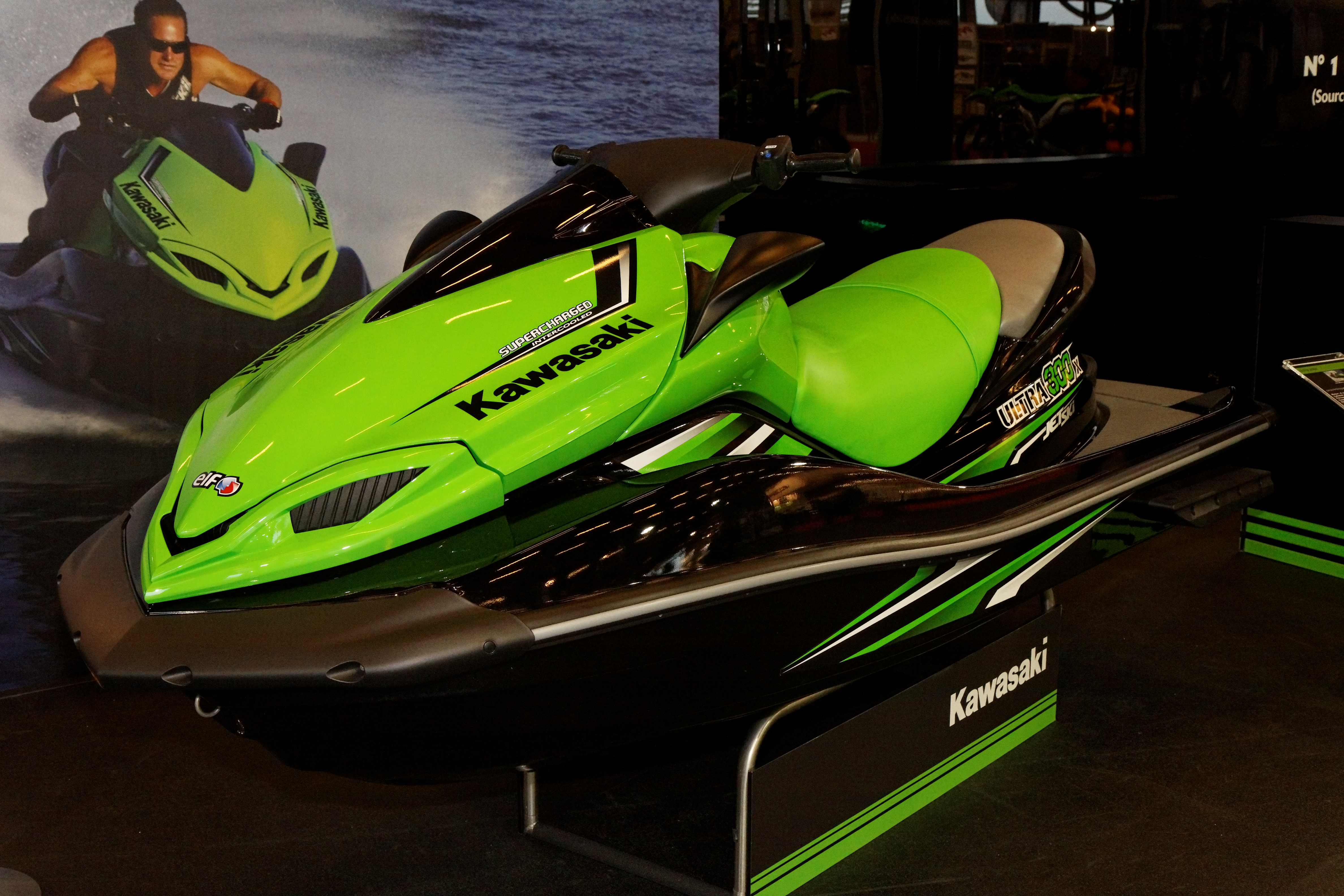 Kawasaki - Ultra 300X